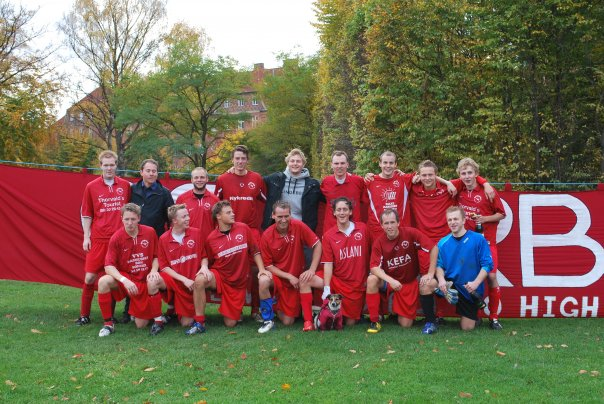 Holdfoto af Skyy Fodbold er et fodboldhold under Østerbro IF, som blev dannet i sommeren 2008. De er i Serie 5.